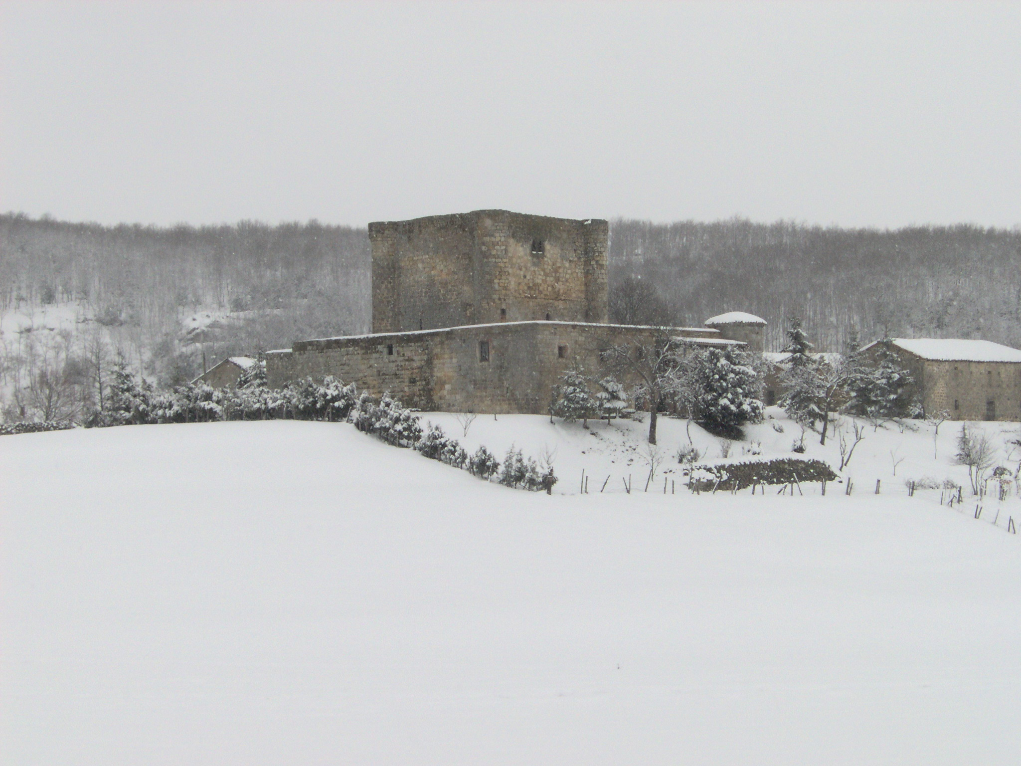 El castillo de Los Porres tras una nevada.